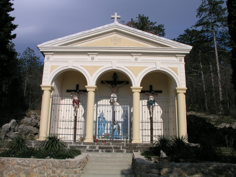 Kalvarija u Dramlju, Hrvatska